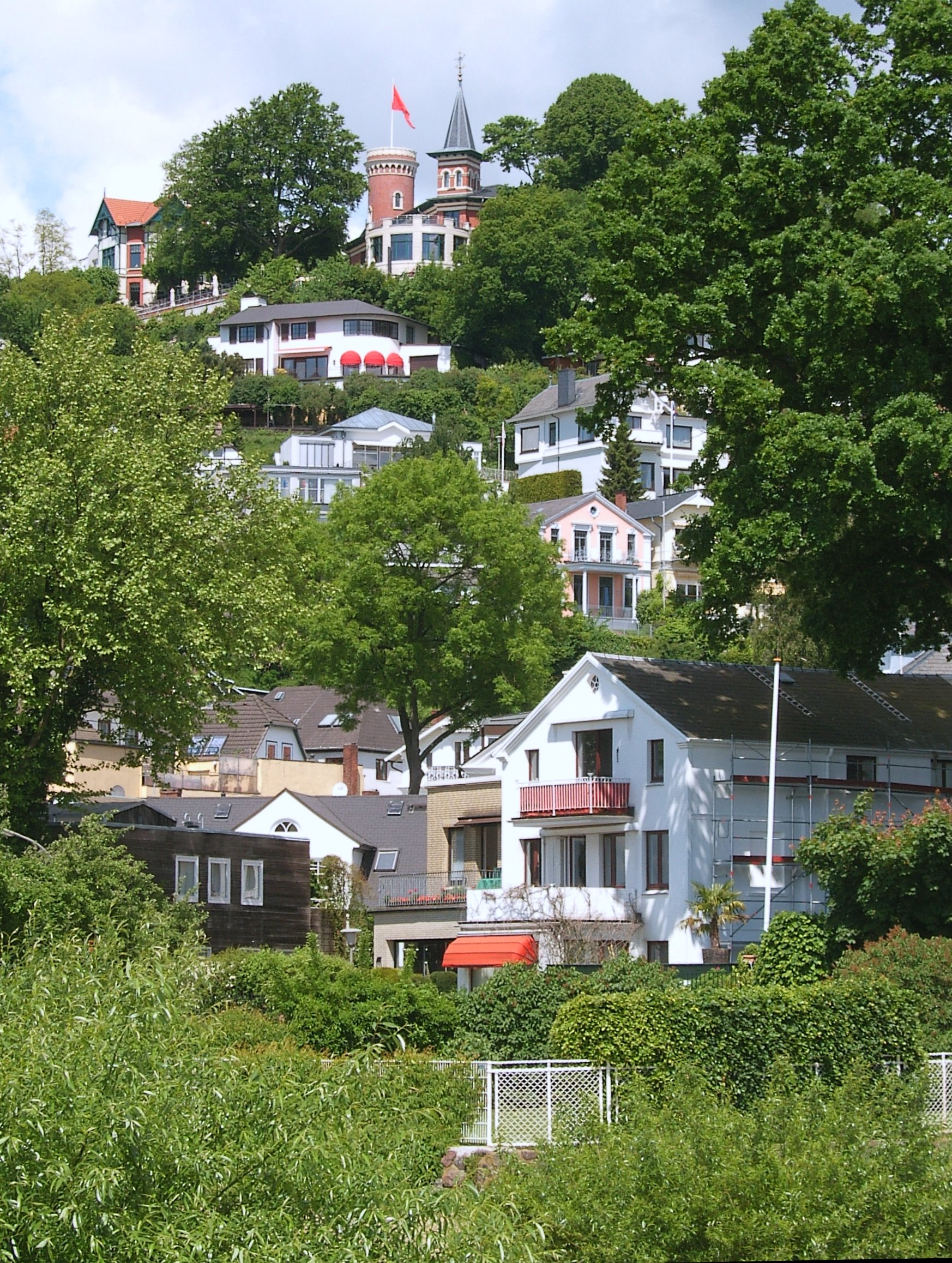 Bildbeschreibung: Hamburg, Blankenese, Süllberg Fotograf: selbst Datum: 2.6.2006